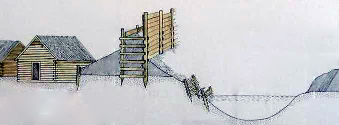 Slawischer_Burgwall; Querschnitt durch einen fiktiven Slawischen Burgwall des 10./11. Jahrhunderts nach den Grabungsbefunden. Nach Günter Schade, Schloß Köpenick, 1966 In: Heimatmuseum Köpenick, Text gleichfalls von dort